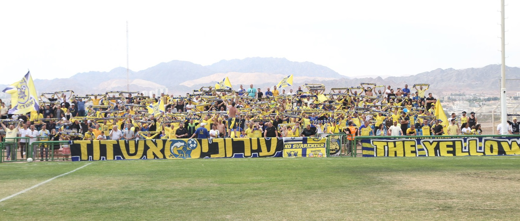 אוהדי עירוני אשדוד במשחק העלייה לליגה א'